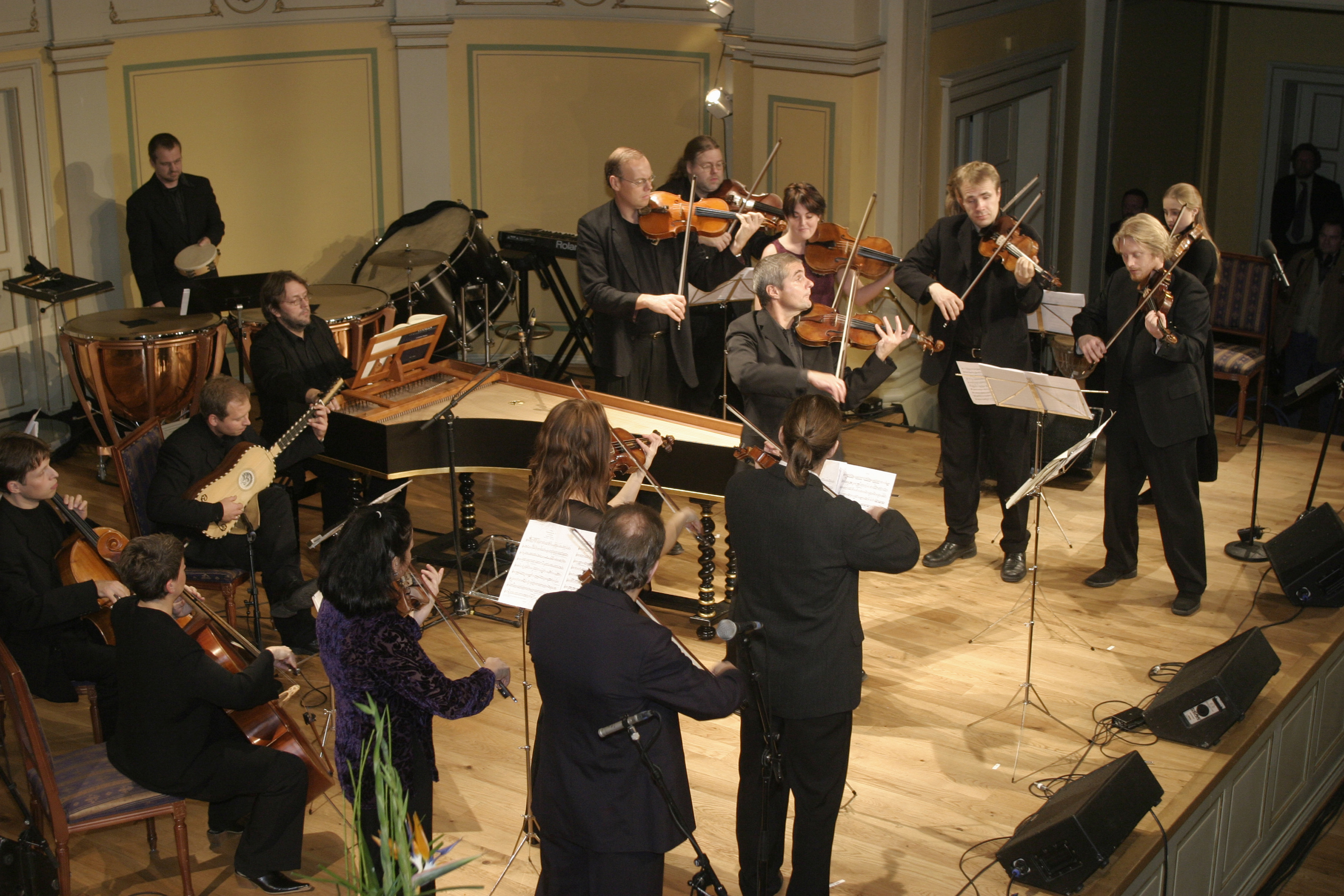 Den Norska kammarorkestern spelar vid Nordiska rådets prisutdelning (Bilden är tagen vid Nordiska rådets session i Oslo, 2003)